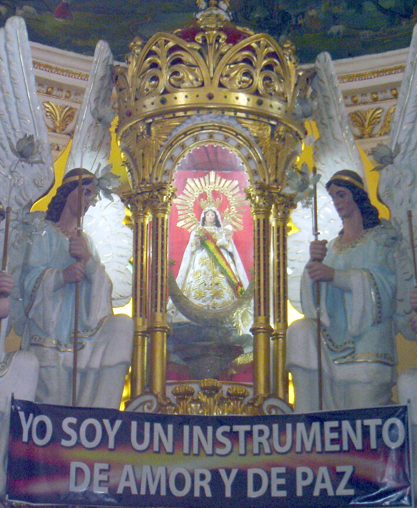 Imagen de la Virgen María de Urqupiña en el altar mayor del templo de San Ildefonso de la ciudad de Quillacollo, Cochabamba.